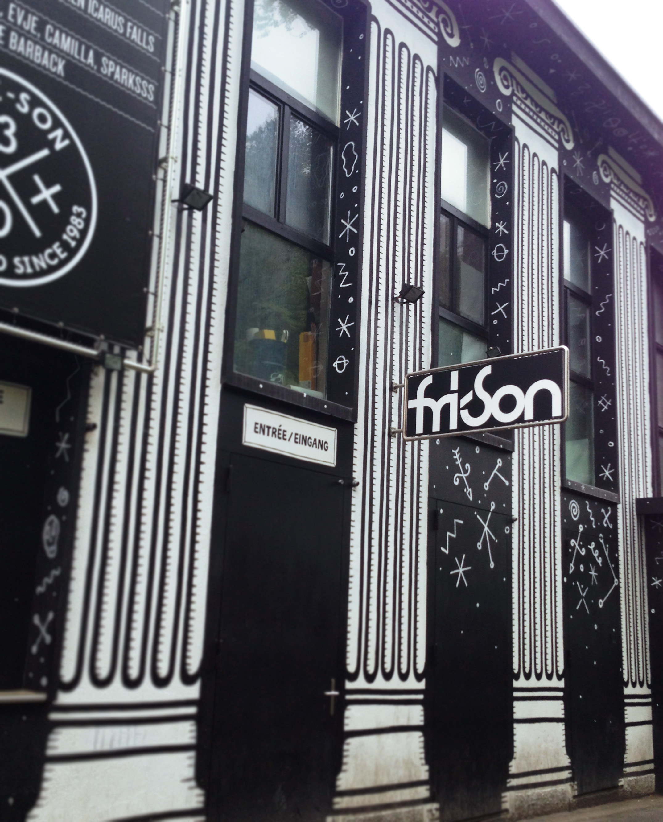 Entrée de la salle de concert Fri-Son, à Fribourg (Suisse)